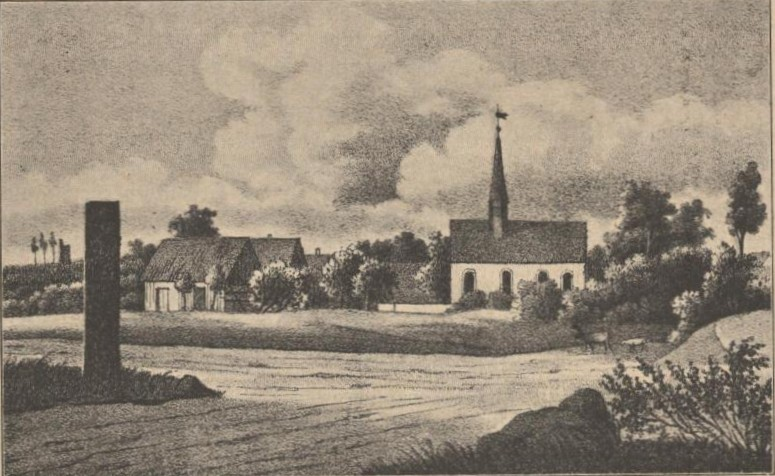 Beiträge zur Sächs. Volks- und Heimatkunde. Mit Zeichnungen von Professor O. Seyffert und Maler F. Rowland.